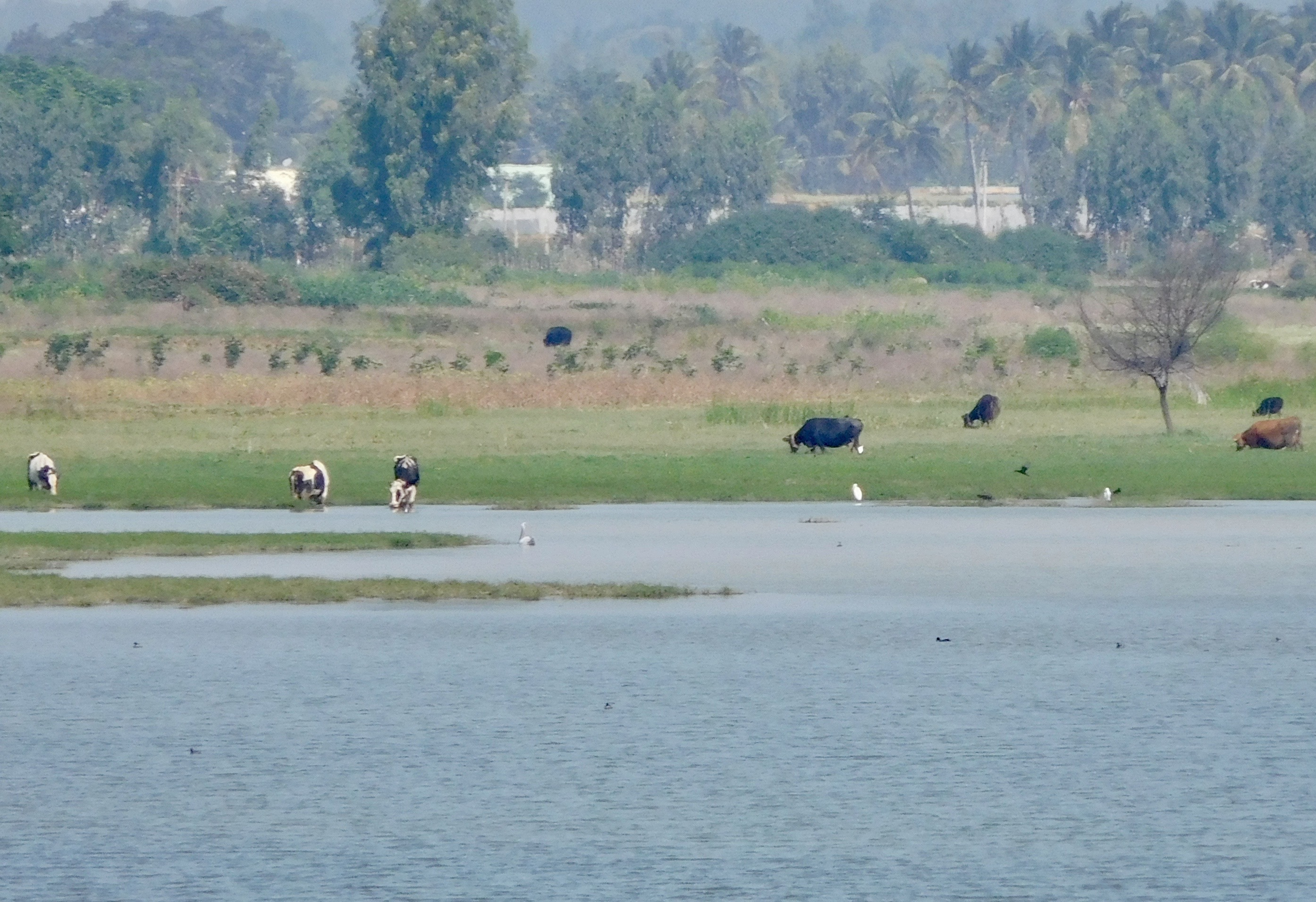 Hoskote lake, Bangalore